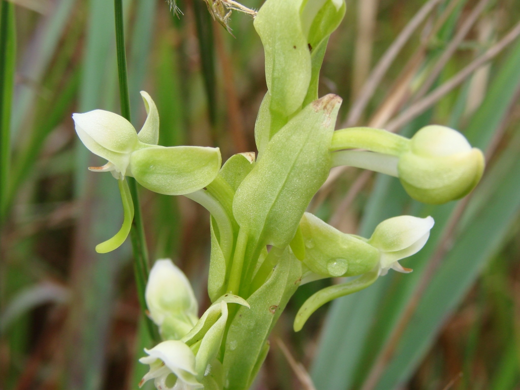 Habenaria obtusa Lindl. - ORCHIDACEAE - Parque Estadual da Serra dos Pirineus - Pirenopolis - Goias - Brasil.